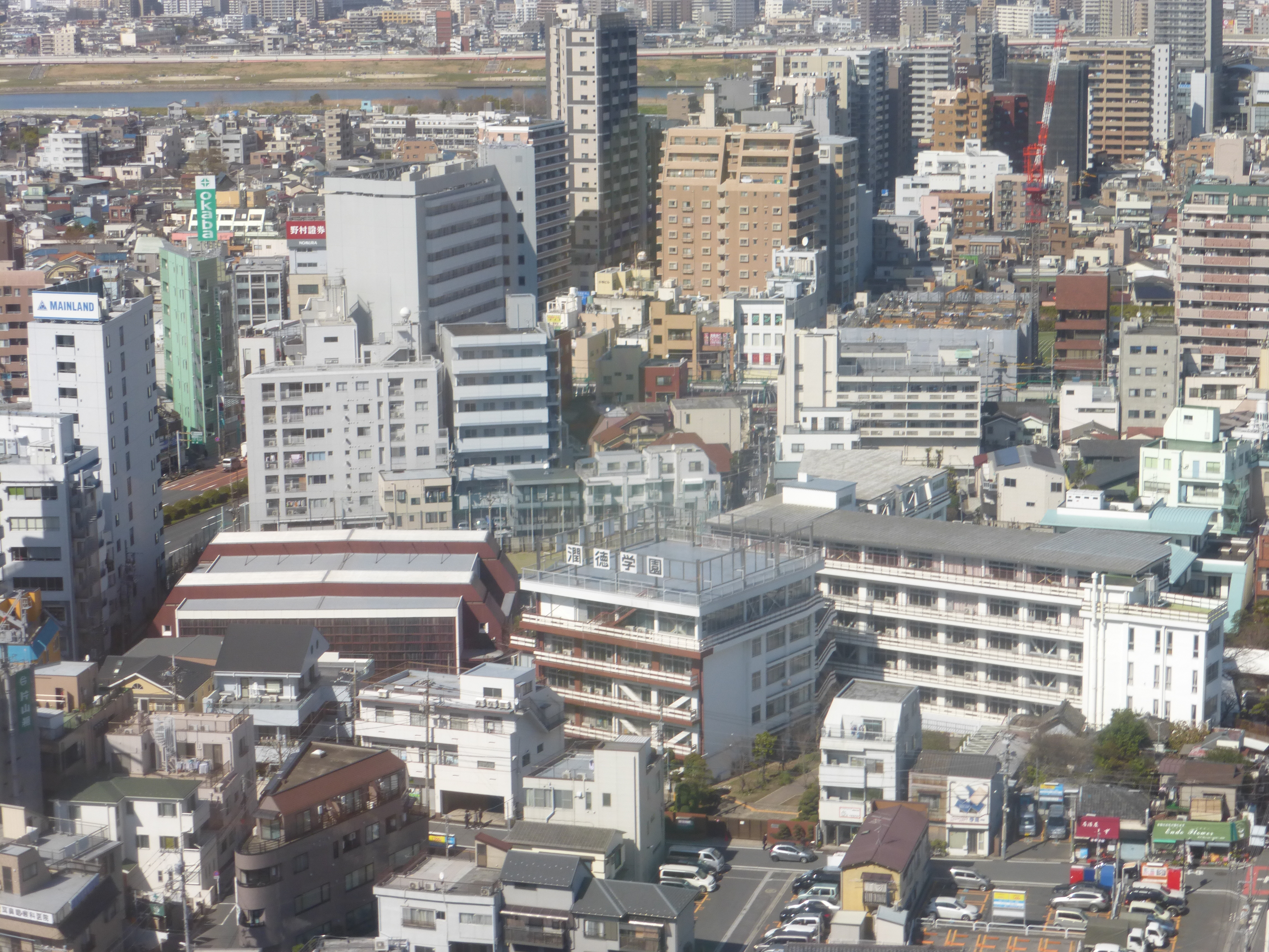 潤徳女子高等学校（じゅんとくじょうしこうとうがっこう, Juntoku Girls' High School）